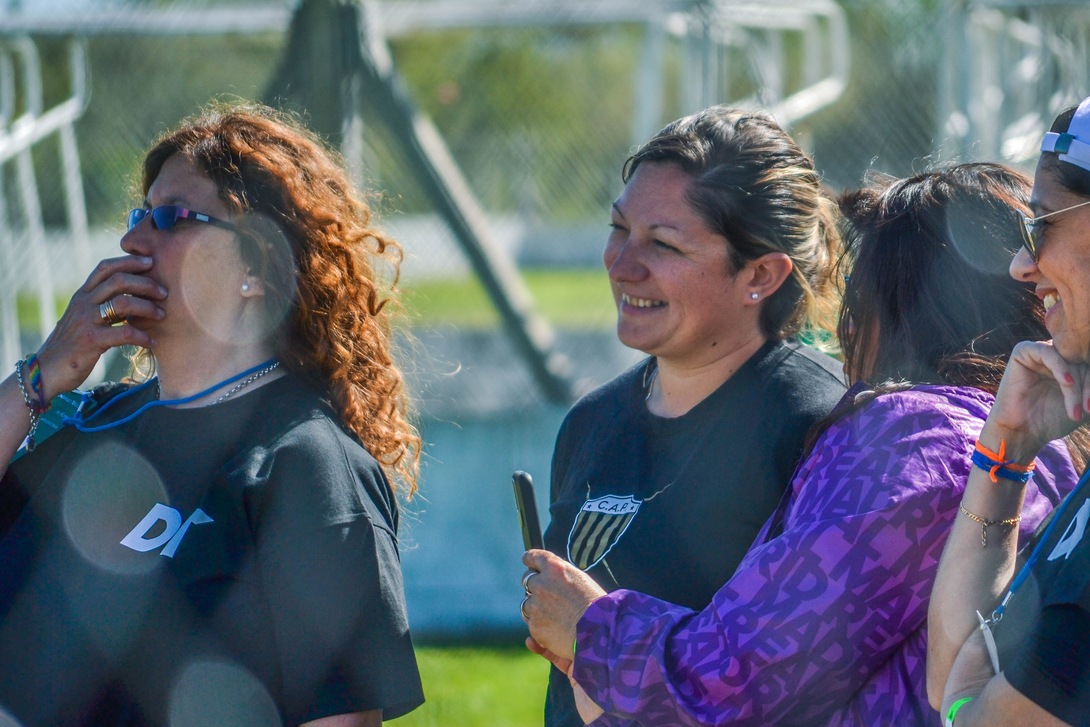 Las mujeres quieren ser el equipo titular en esta disputa por la igualdad y capacitarse hace rodar la pelota: en una apuesta al desarrollo de una plataforma a futuro para las directoras técnicas, llega el primer congreso nacional organizado por ATFA y el escenario para este histórico evento es Santa Fe.